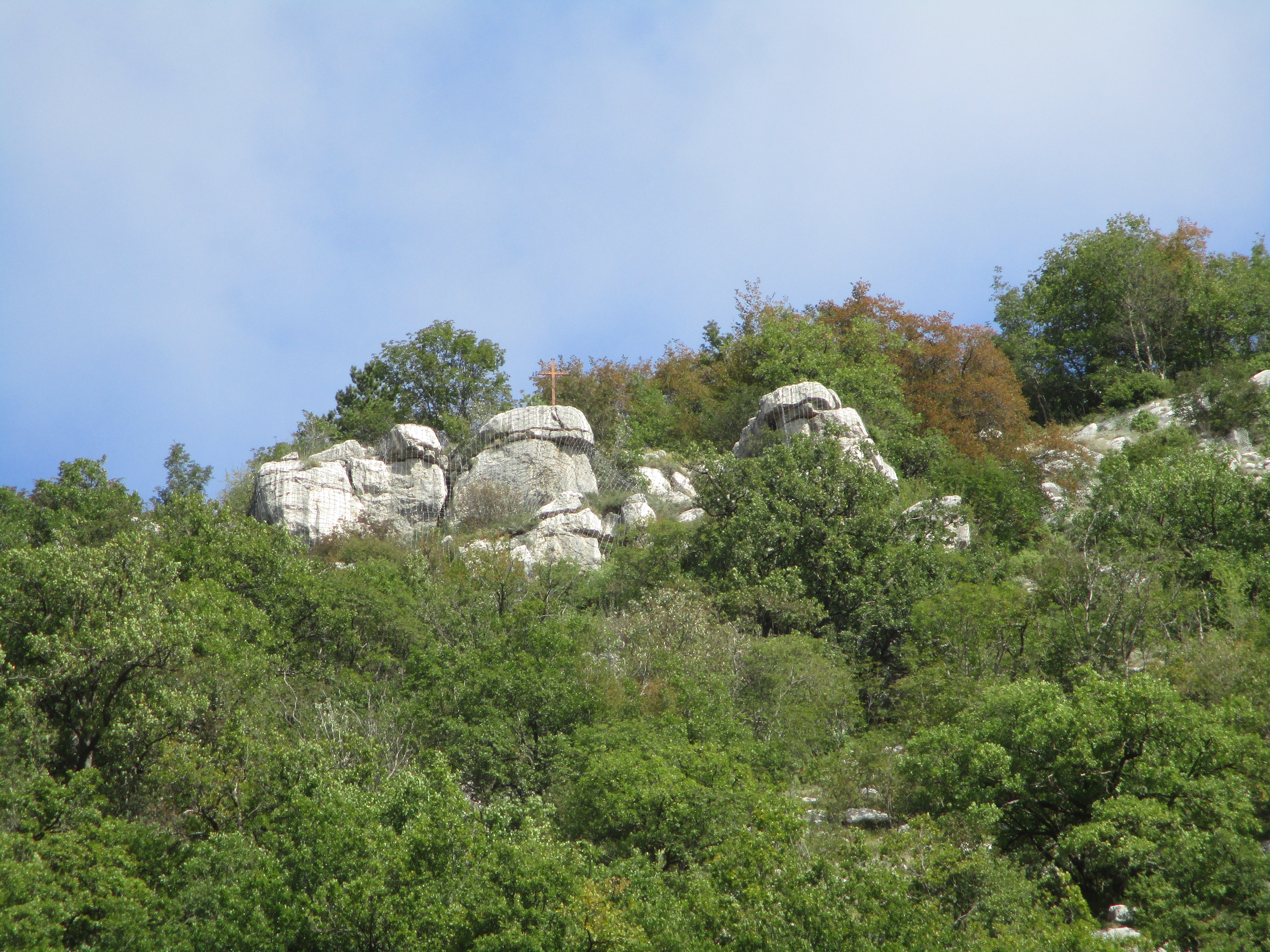 Rocce incatenate di Pagliara